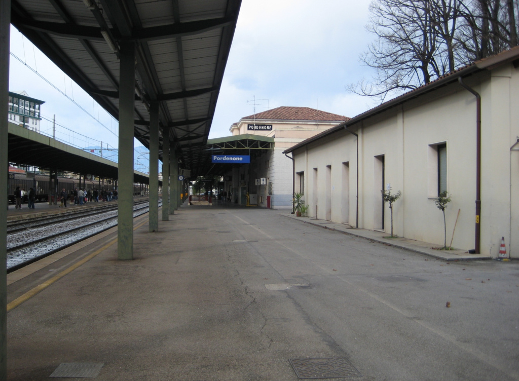 Stazione di Pordenone lato binari